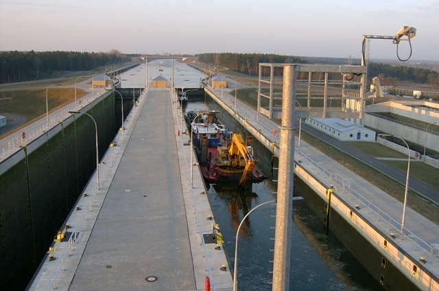 Schleuse Hohenwarthe Photo: R. Vorreyer